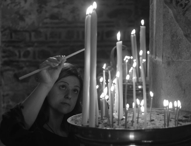 Косово и Метохија: Хришћанка пали свећу у српском православном манаастиру Дечани.Фотографије из пројекта "Корени душе". Фото:Дарко Дозет